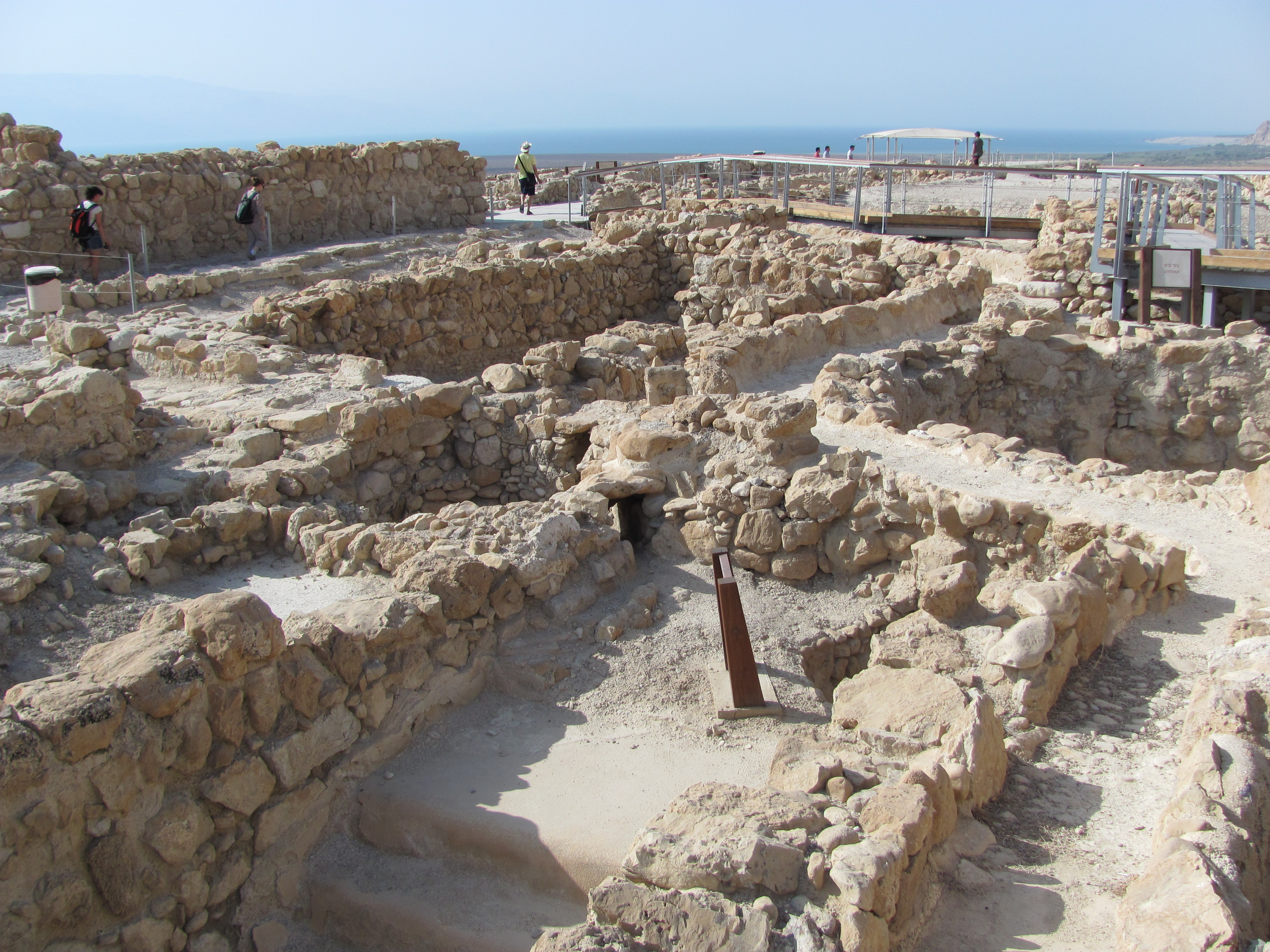 Qumrán es el nombre árabe contemporáneo dado a unas ruinas, donde habría habitado una comunidad de la congregación judía de los esenios, situadas en una terraza a cerca de dos kilómetros del Mar Muerto